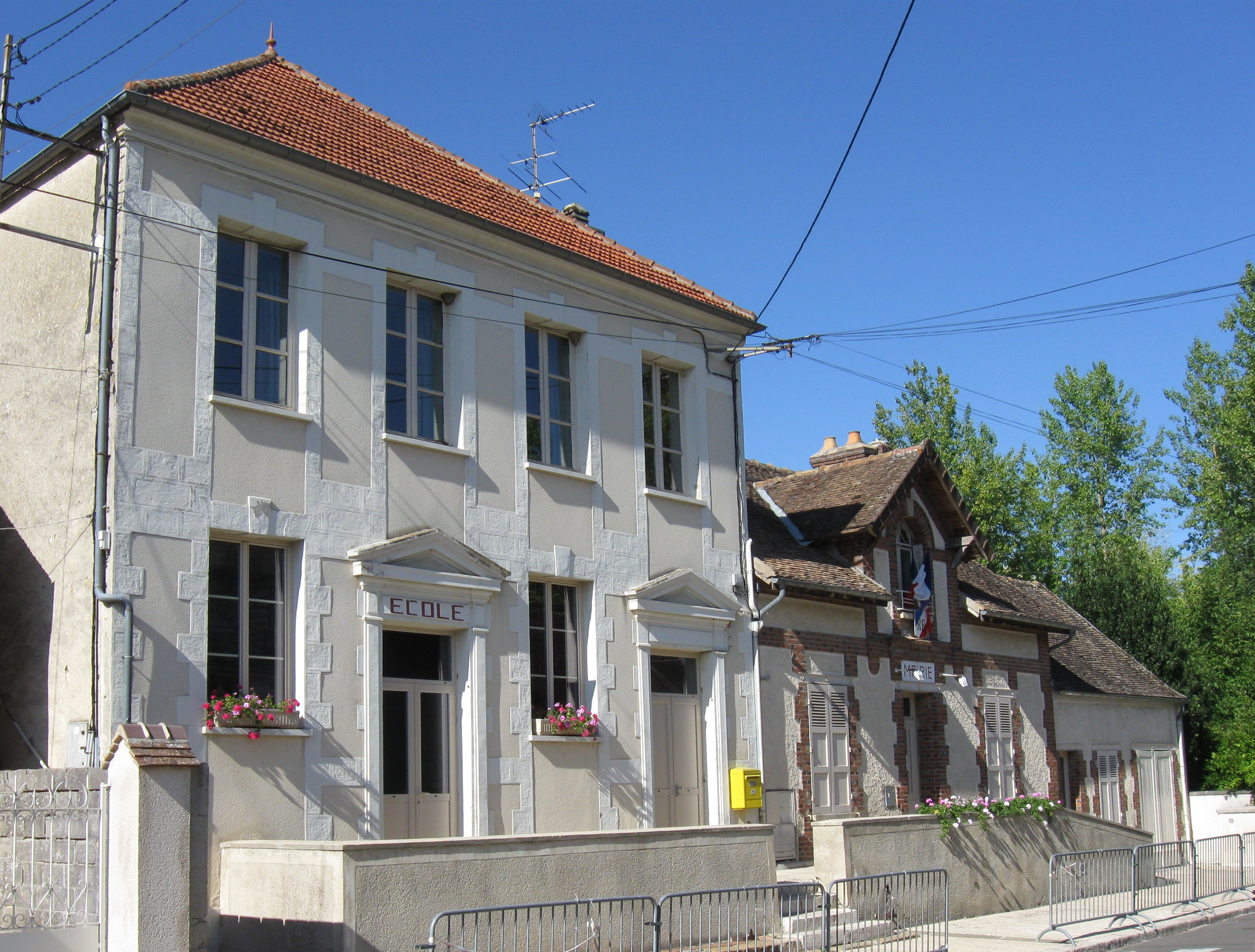 Mairie et école d'Égligny. (Seine-et-Marne, région Île-de-France).